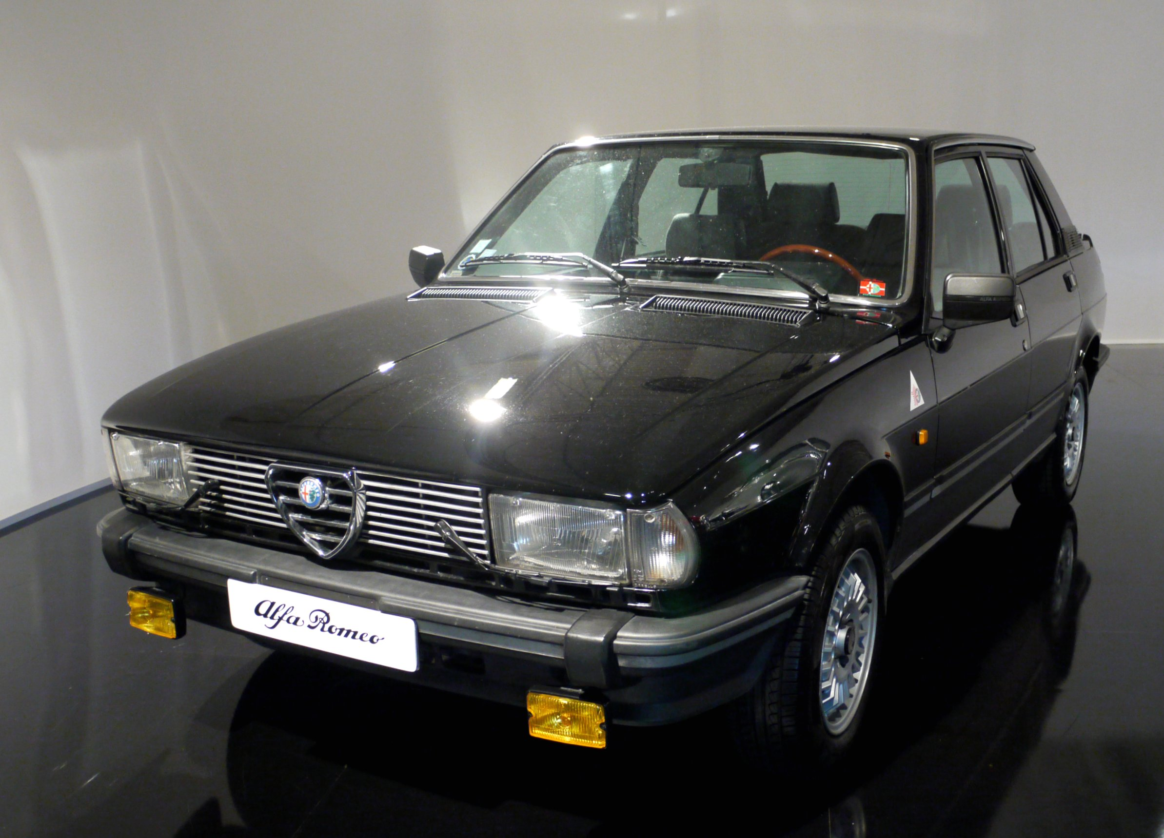 1977-1985 Alfa-Romeo Giulietta Nuova.